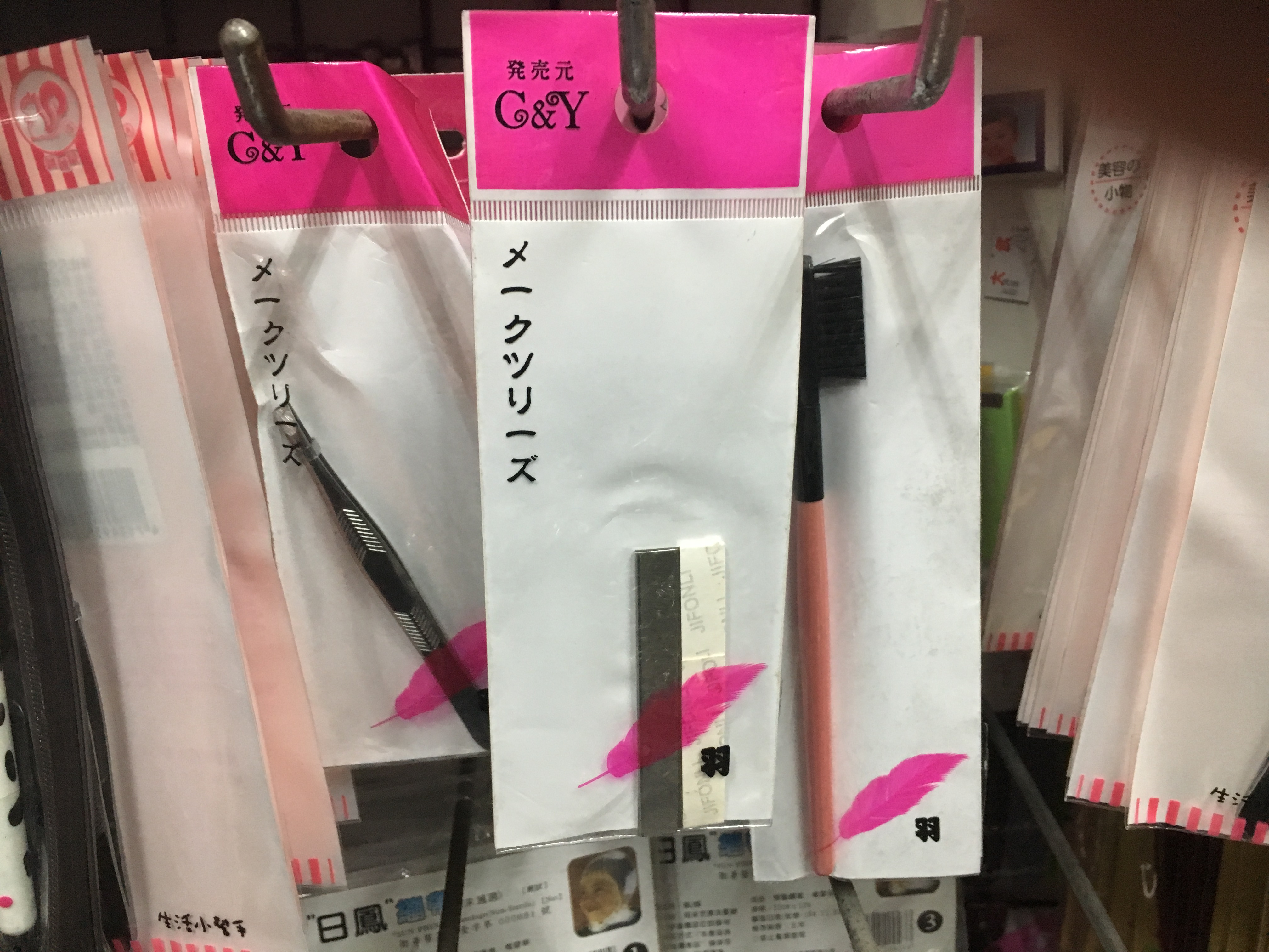 台湾で販売される商品での日本語の誤植例